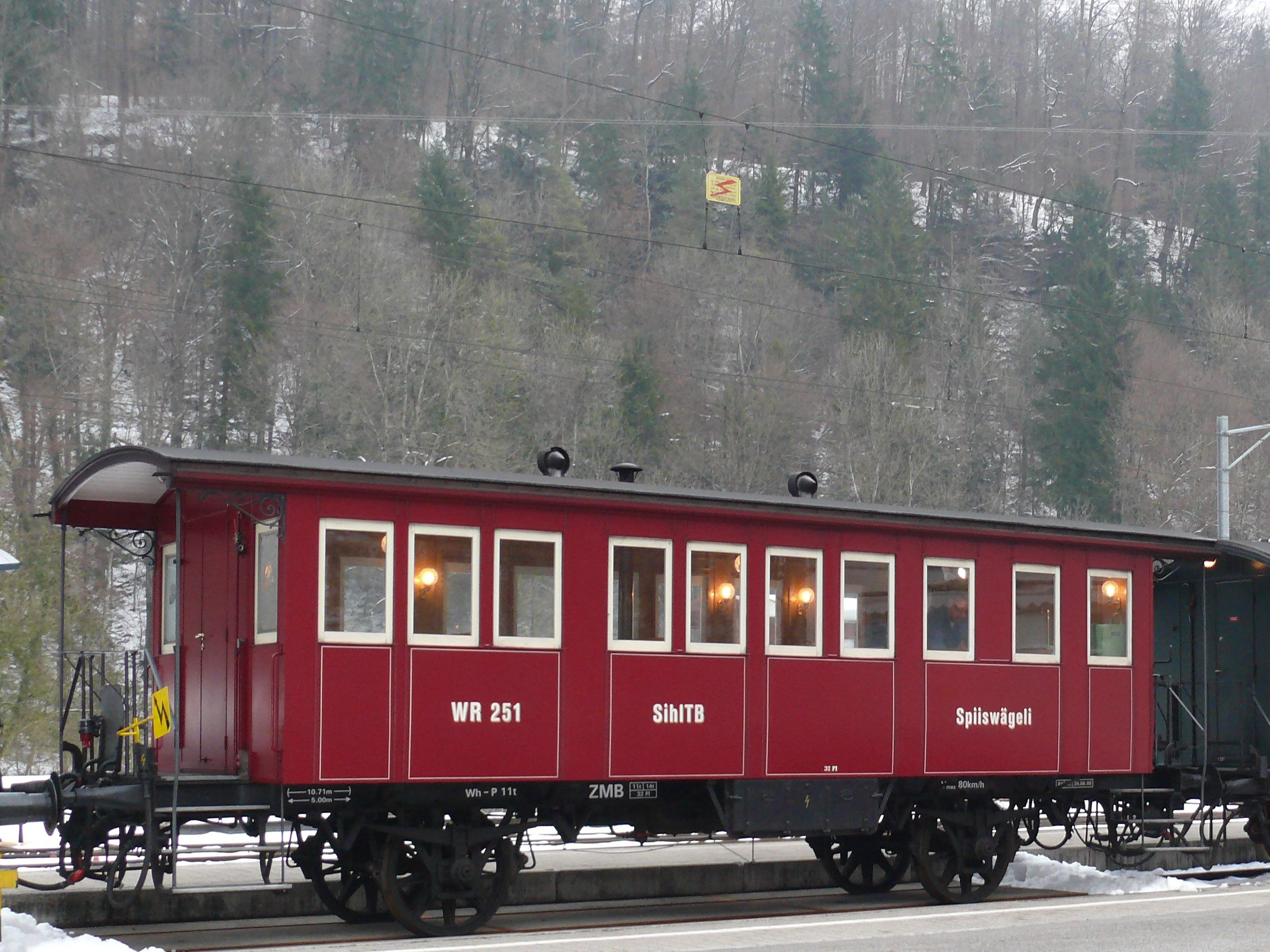 Das 1999 renovierte "Spiiswägeli"